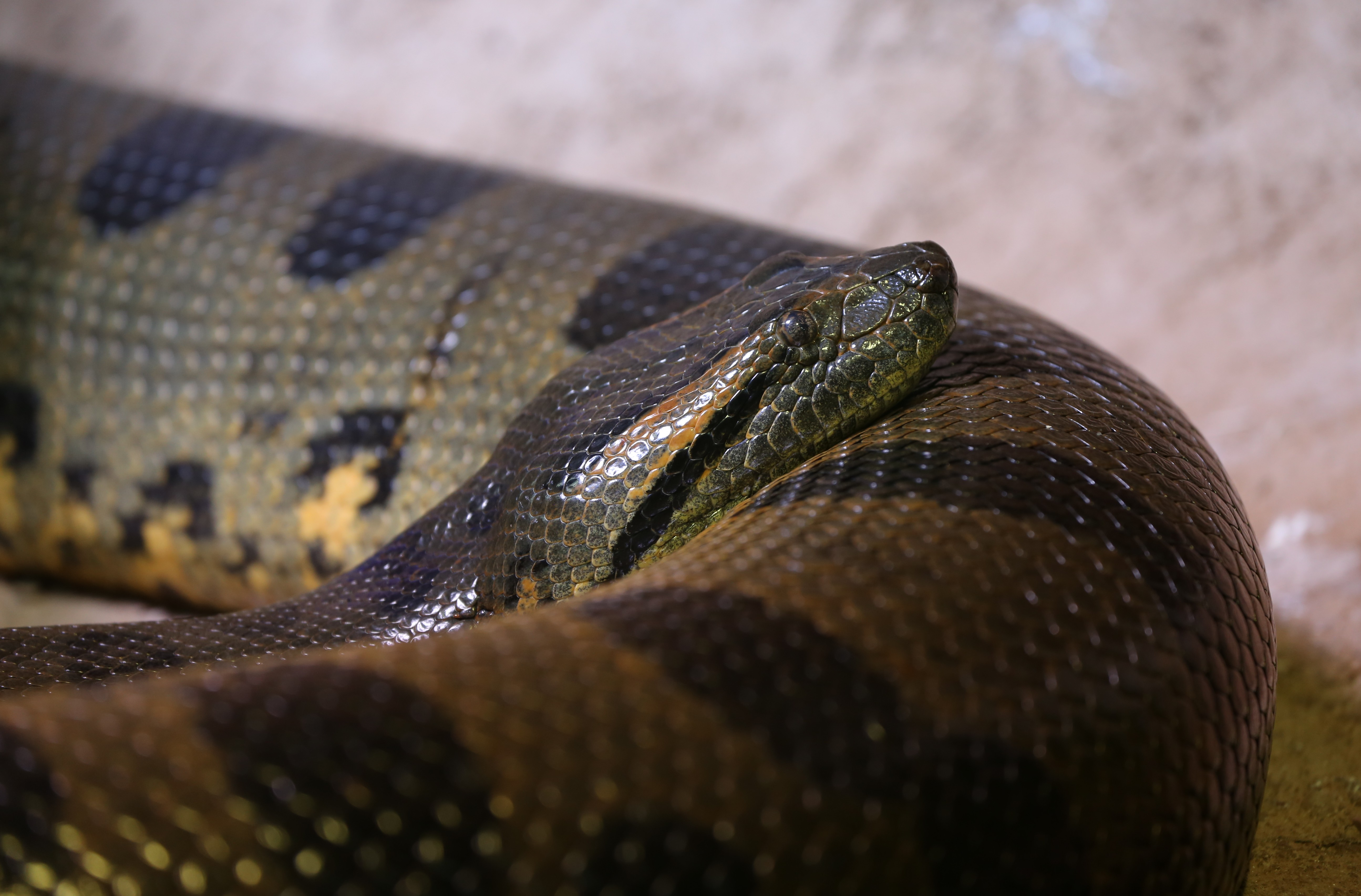 Tierpark Hellabrunn, München Grüne Anakonda (Eunectes murinus), Tierpark Hellabrunn, München